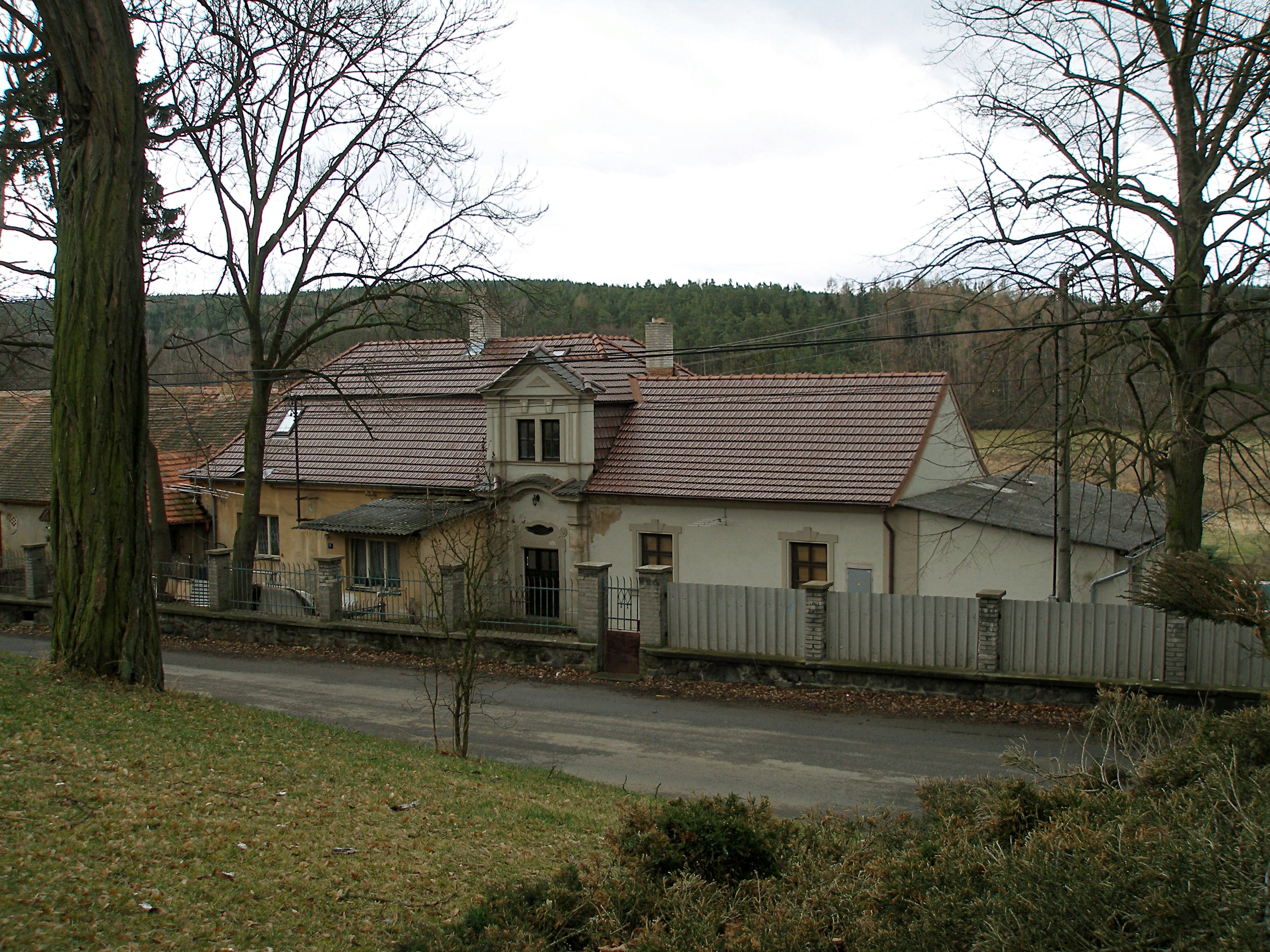 Zachovalá část zámku v Sudovicích